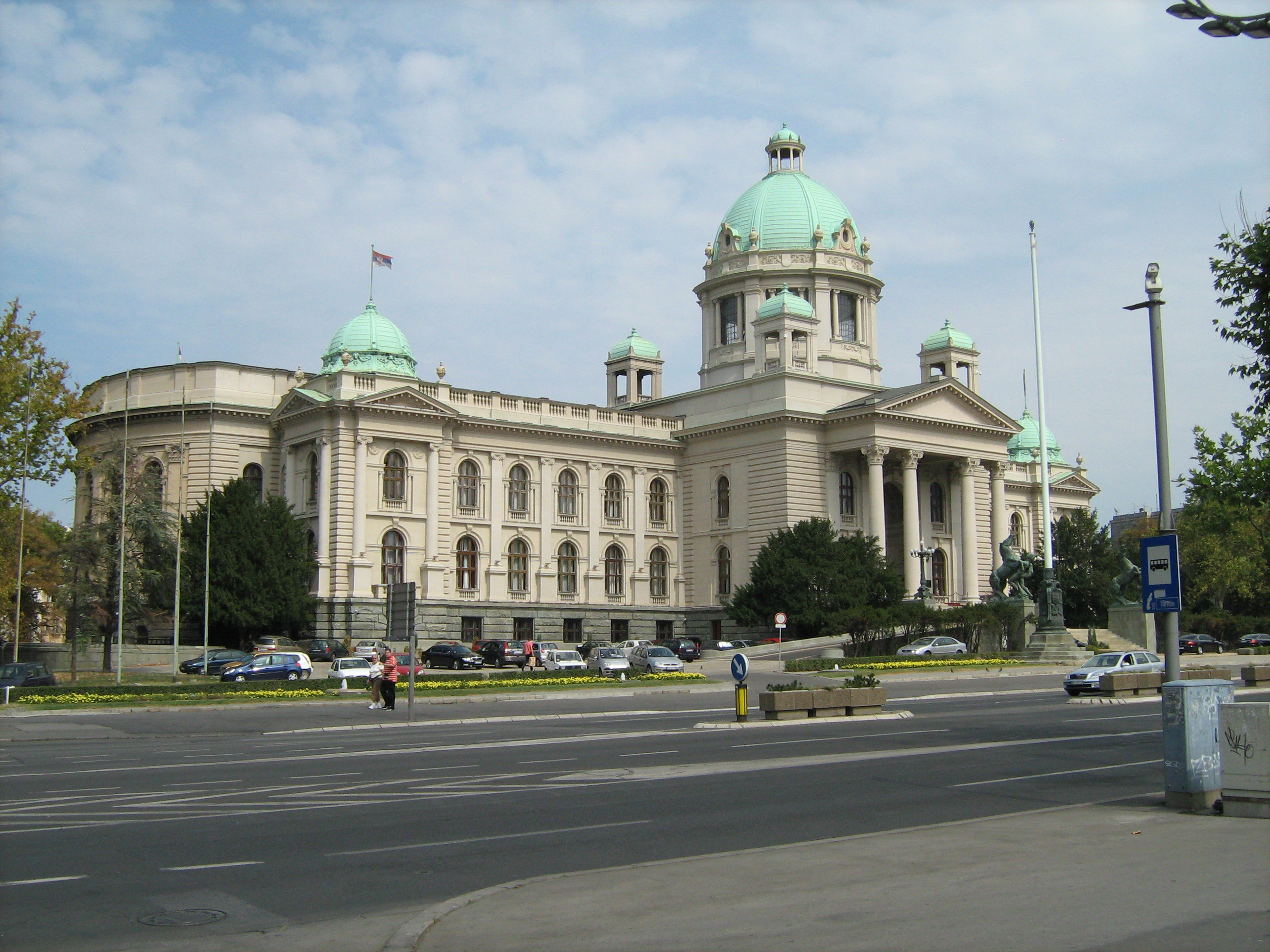 Дом Народне скупштине